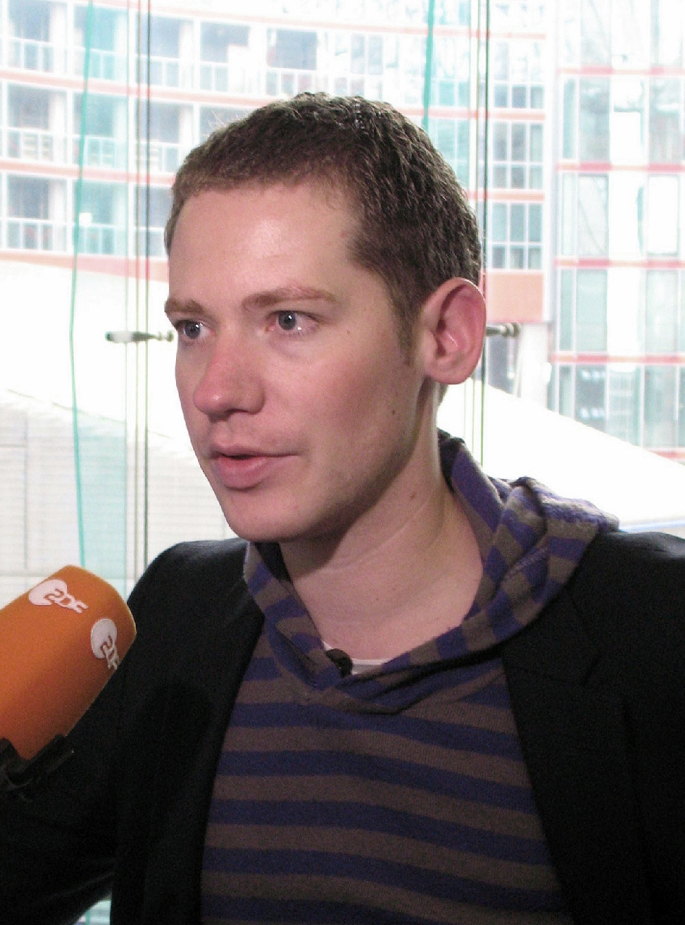 Marco Kreuzpaintner nach der Pressekonferenz zur deutschen Filmpremiere Trade, Berlin, 11.10.2007